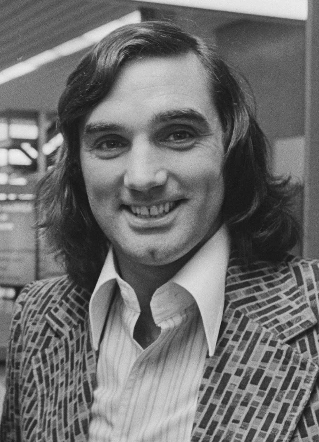 Portrait de George Best en 1976